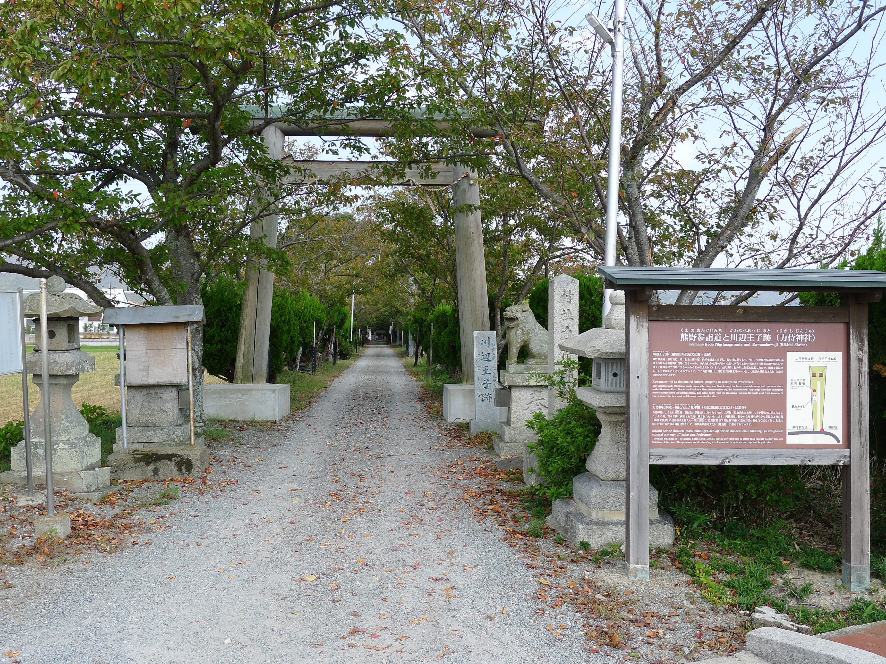 熊野古道・紀伊路の九十九王子の一つ中村王子を合祀する力侍神社（和歌山県和歌山市）